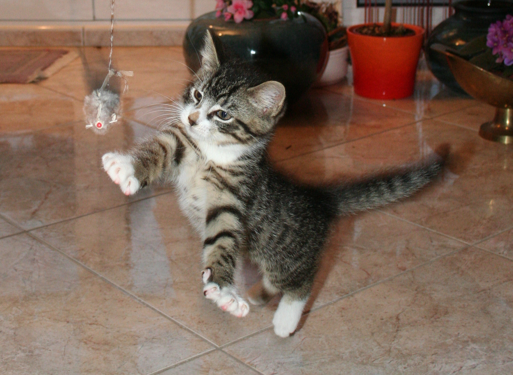 a young playing cat